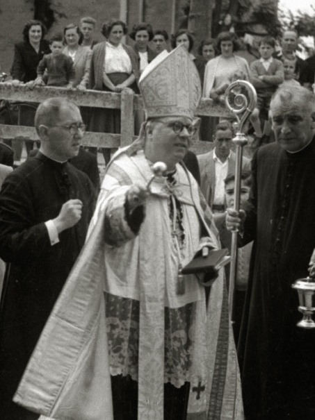 Título original: Recibimiento del obispo Jaime Font y Andreu a la localidad de Villabona (1/25) Localización: Villabona (Guipúzcoa)